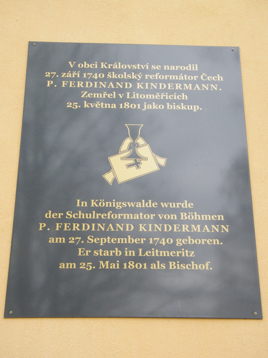 Kostel svatého Vavřince v Království u Šluknova